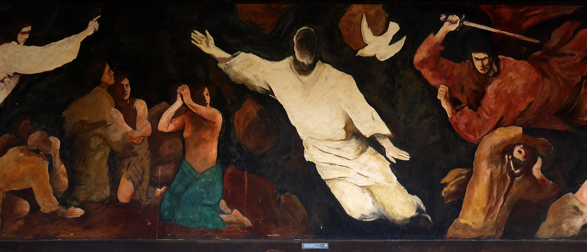 Heinrich Altherr-Fauser (1878–1947) Kunstmaler, Portrait, Fresken, Glasmalerei. Wandfresko Mittelteil von «Das Jüngste Gericht» auf dem Friedhof am Hörnli, Riehen, Basel-Stadt